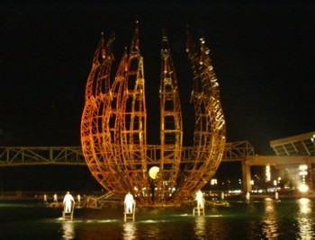 Imagen de del espectáculo Mover el Mundo del Fórum Universal de las Culturas de Barcelona. Imagen tomada por PauBu el 4 de julio de 2004. Publicada bajo licencia GNU FDL.